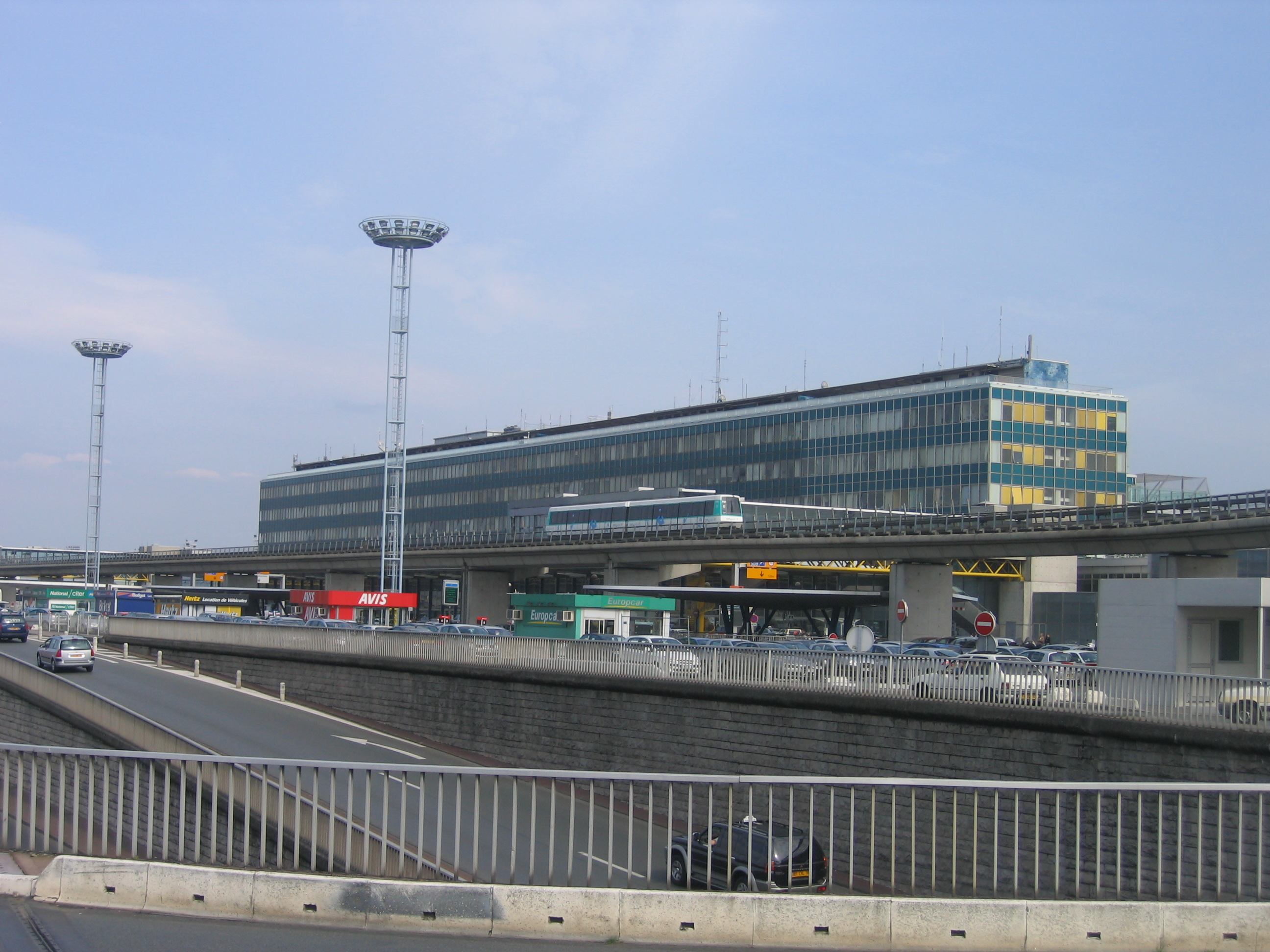 Véhicule Automatique Leger devant Orly Sud